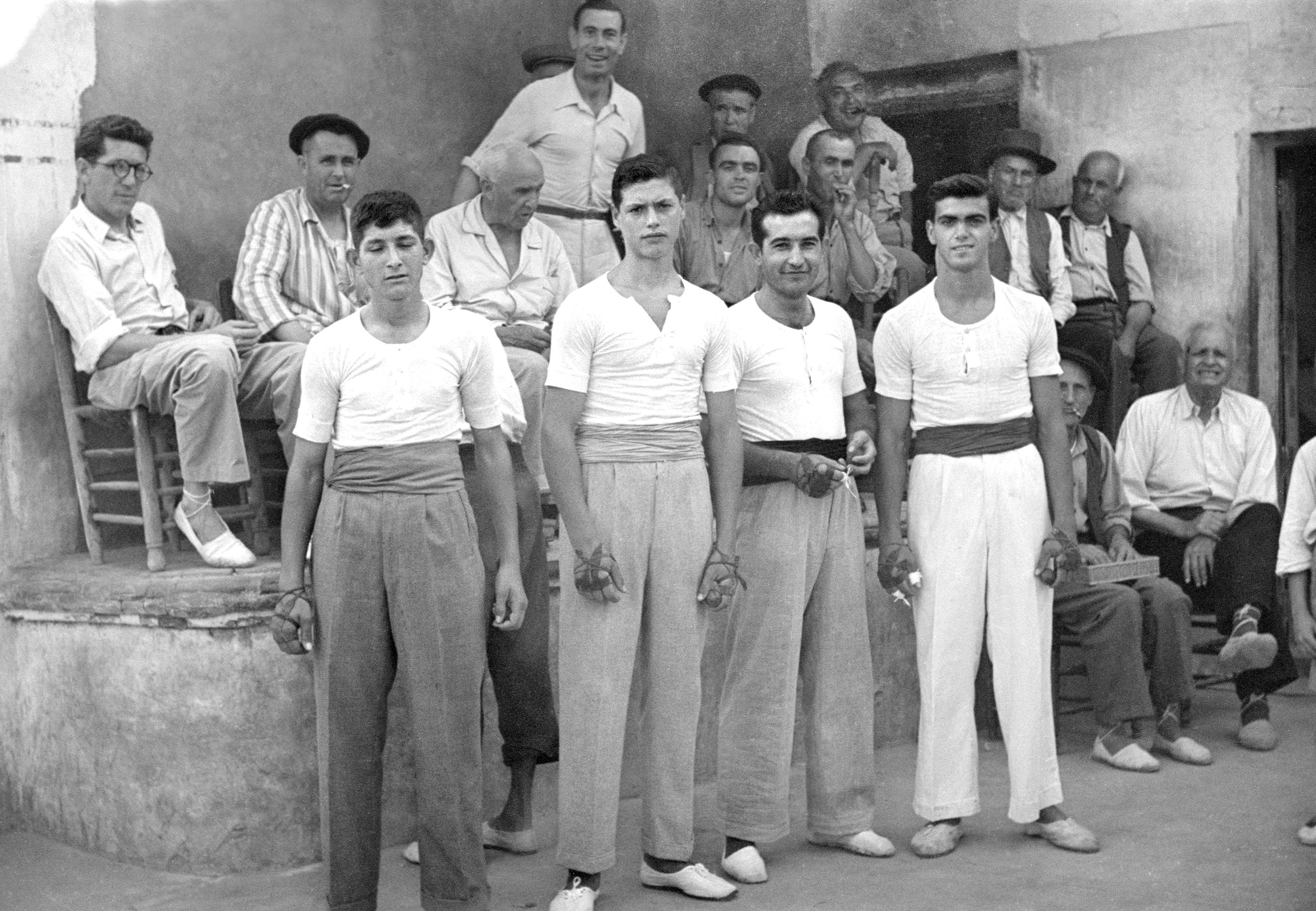 L'Arxiu allibera avui aquesta imatge feta per Ismael Latorre en el trinquet d'Alginet el 20-08-1948. Podrem gaudir d'aquesta imatge aquest any 2017 també en Aljannat VI dedicat als esports de l'ajuntament d'Alginet. 32 fotos de l'arxiu seran editades segons el contracte del 28 de març de 2017 entre l'Arxiu i l'Ajuntament d'Alginet. Aquesta foto va ser publicada en: Grup de treball PLÈIADES de l'IES D'Alginet: Ventall d'imatges. Alginet al voltant de 1950 ISBN 84-688-5221-X, pàgina 32. Col·lecció: Joc, Espai i Xarxa, dedicada a la pilota valenciana de l'Editorial això és com tot, 01 Alginet, De les mans i fer anar la pilota, any 2014, ISBN 978-84-942574-0-7, pàgina 98. Tractament digital: Carolina Latorre Canet.